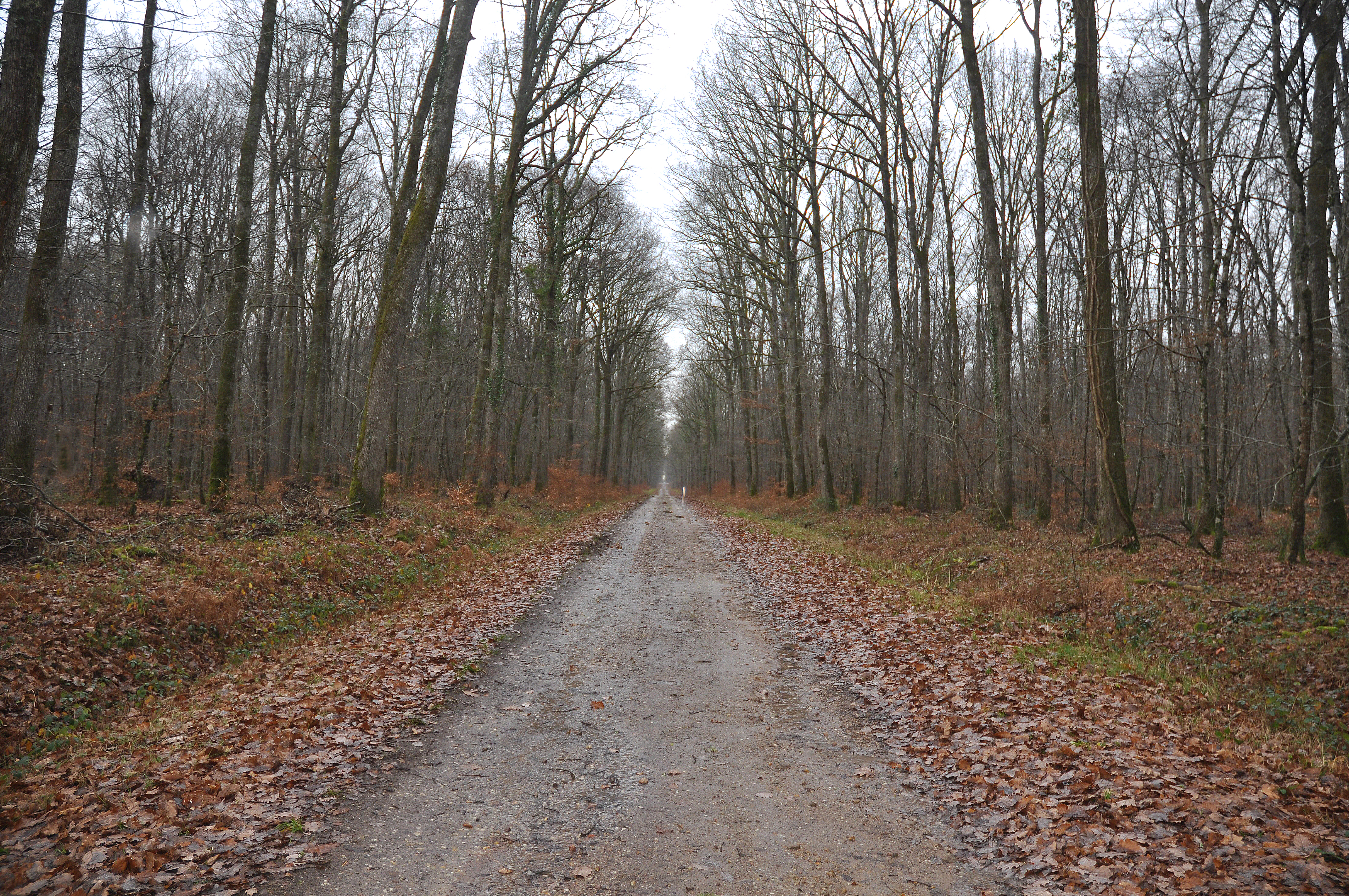 La piste que nous voyons, se trouve dans la plus belle forêt de chênes d'Europe. Tronçais. A proximité du "chêne carré". Photo prise dans l'Allier en France. Nous sommes en décembre 2011, une pluie fine tombe sur les grands arbres dépourvus de feuilles.C'est en fin de journée.